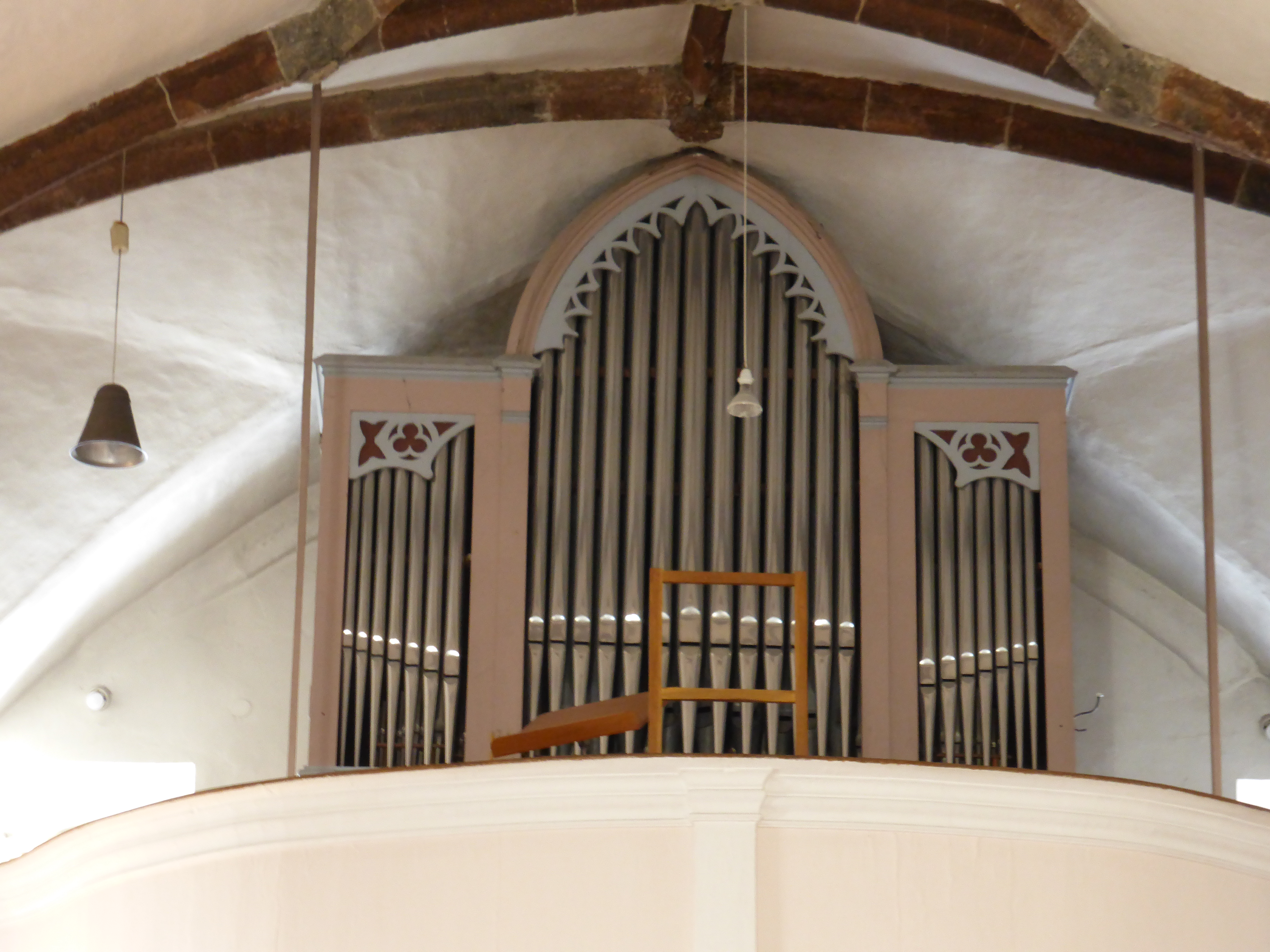 M. Mauracher-Orgel von 1870